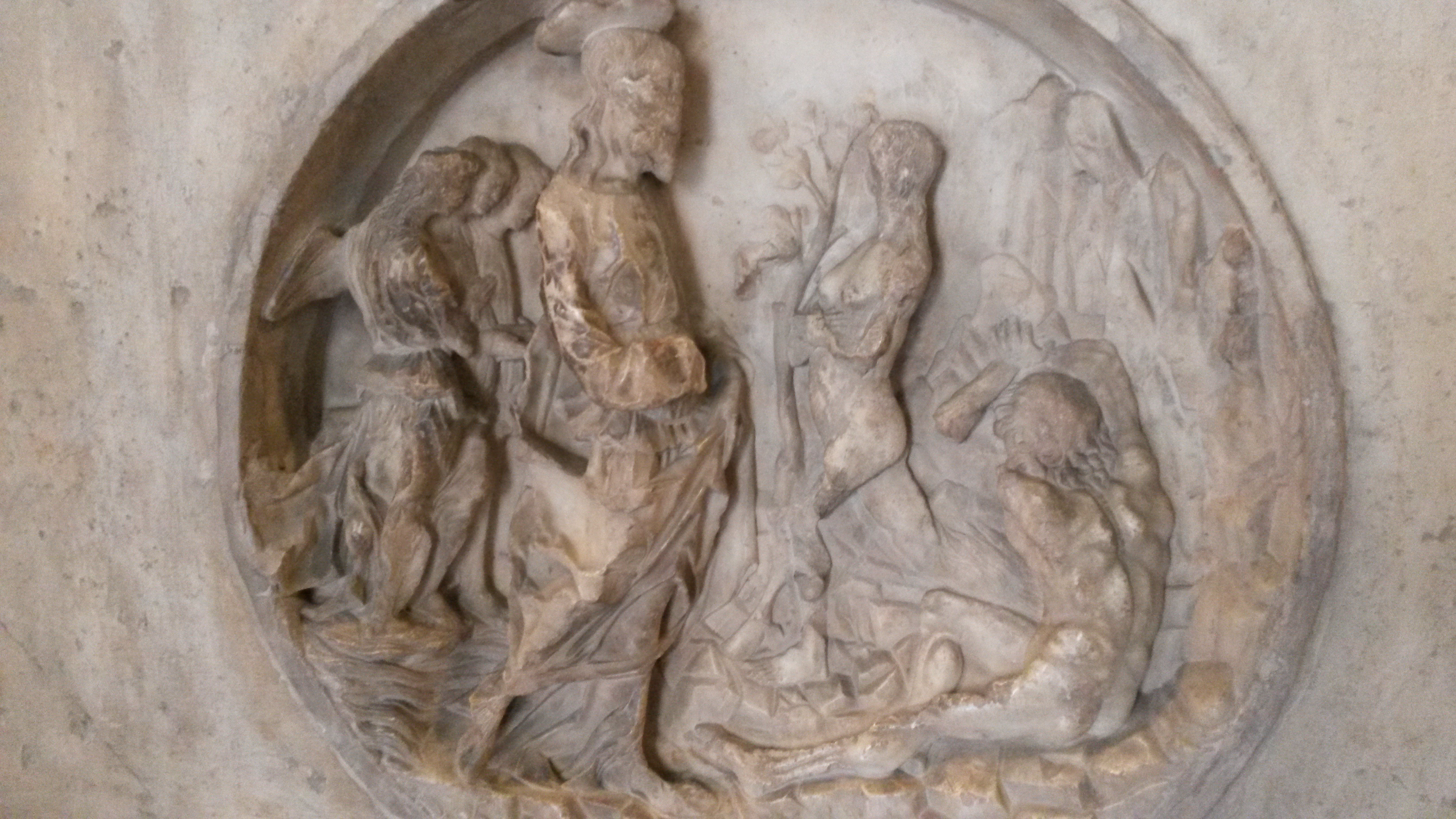 Giovanni Antonio Amadeo, Rilievi provenienti dalla facciata di Santa Maria presso San Satiro, Milano, Castello Sforzesco